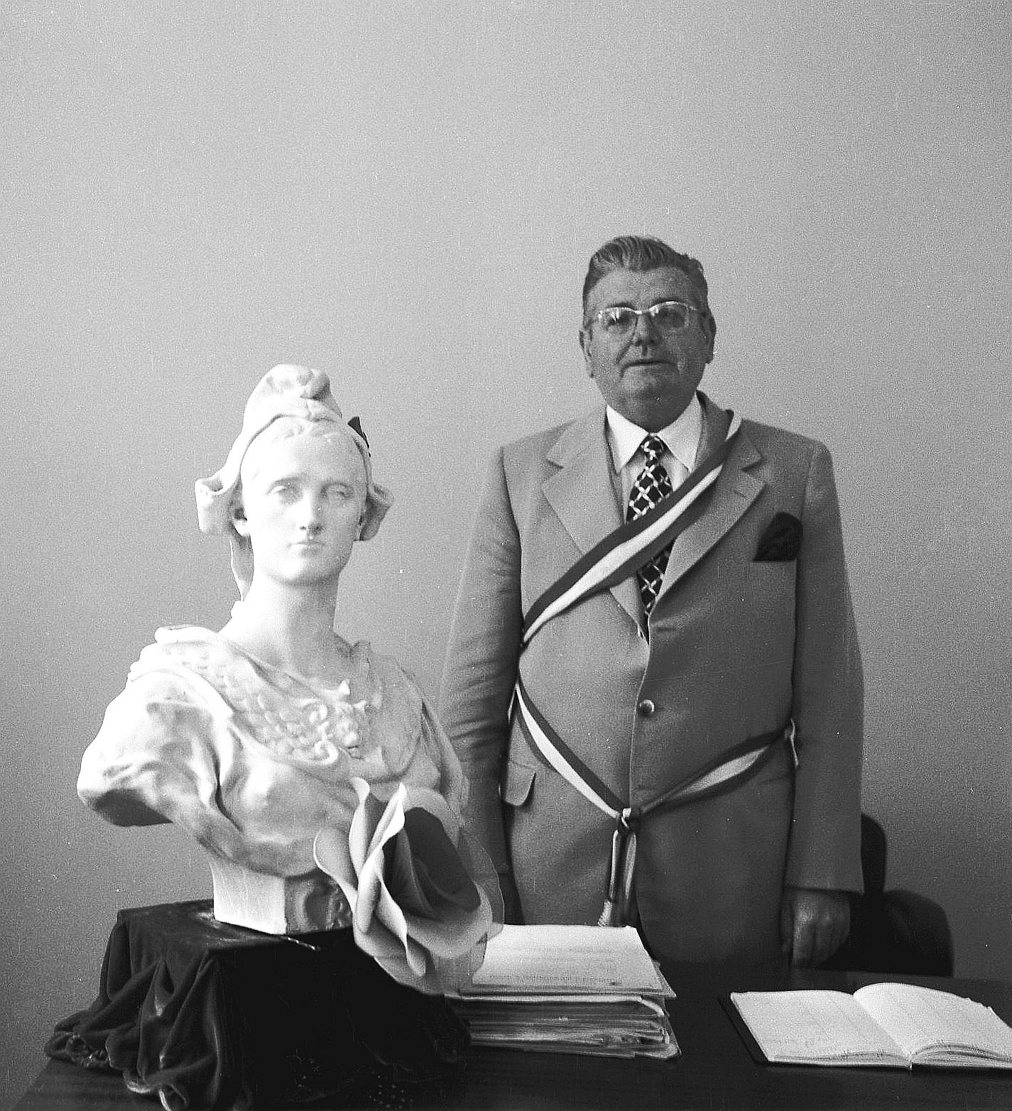 Mairie de Noé (Haute-Garonne). 21 Juillet 1974. Portrait en plan taille de Jean-Baptiste Doumeng, maire de Noé, arborant l'écharpe tricolore et posant derrière son bureau à côté d'un buste de Marianne.